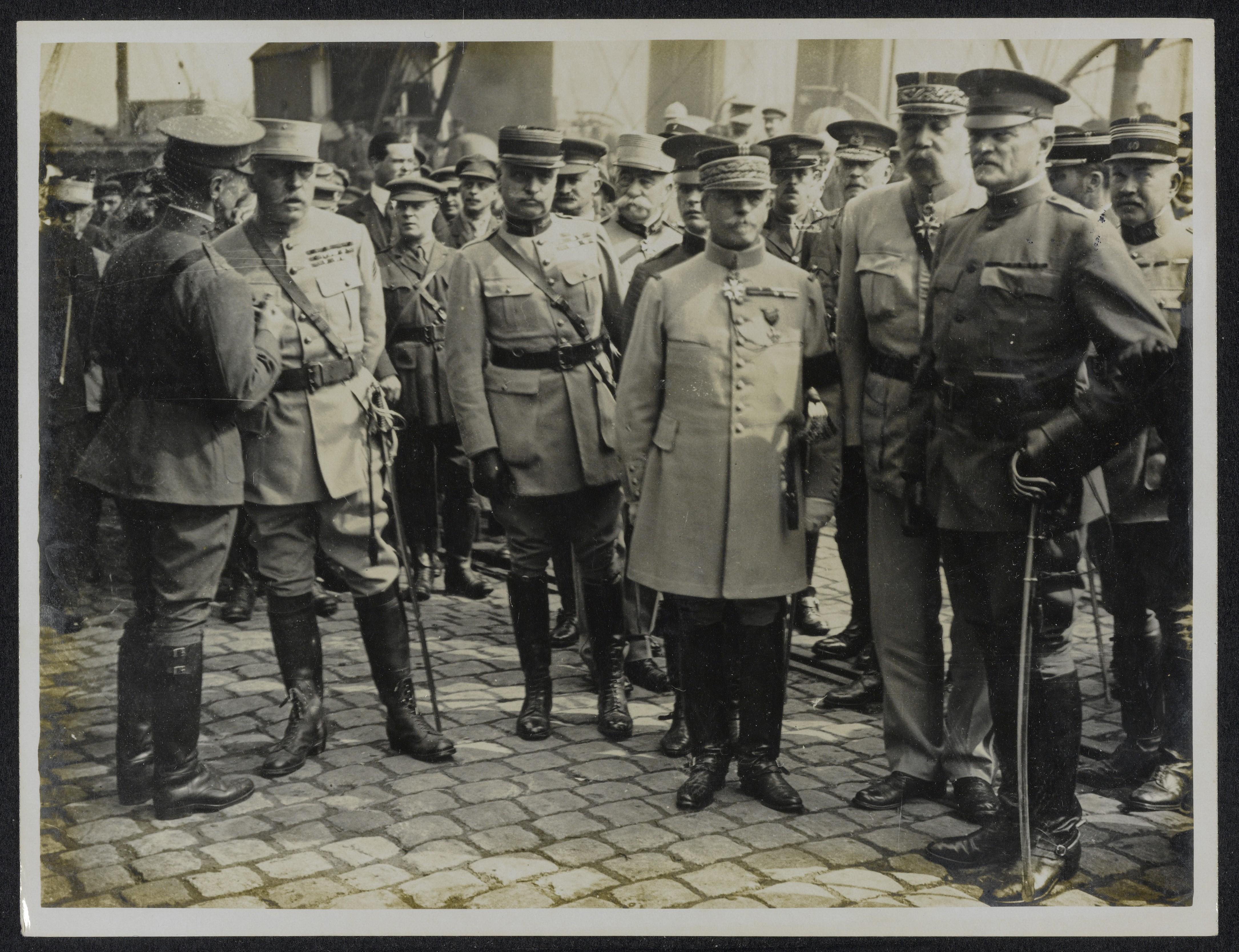 Collectie / Archief : Fotocollectie Eerste Wereldoorlog Reportage / Serie : The British Western front in France Beschrijving : Lt. Gen. Pershing (Chief of American Expeditionary Force) on the quay after landing in France* On June 13, 1917, Pershing landed at Boulogne, France, and was met by French and British military officers from the front, and an honor guard; More information Annotatie : Het Britse Westelijk front in Frankrijk. Lt. Generaal John J. Pershing [1860-1948] op de kade bij aankomst in Frankrijk Datum : 1917-06-13 Locatie : Frankrijk Trefwoorden : eerste wereldoorlog, expeditielegers, fronten, havens, legercommandanten Persoonsnaam : Pershing, John J. Fotograaf : LNA Auteursrechthebbende : Public Domain logo Materiaalsoort : Foto (zwart/wit) Nummer archiefinventaris : bekijk toegang 2.24.09 Bestanddeelnummer : 158-0952